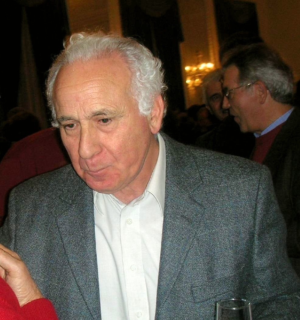 Jakin aldizkariaren sortzaileetako bat, haren 50. urteurreneko ekitaldian, Donostiako Miramar jauregian